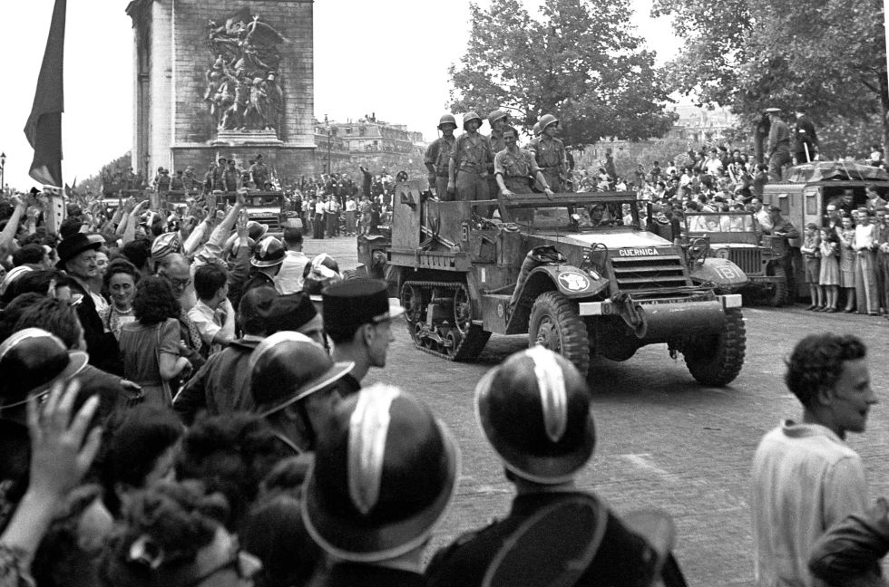 foto vehiculo la nueve